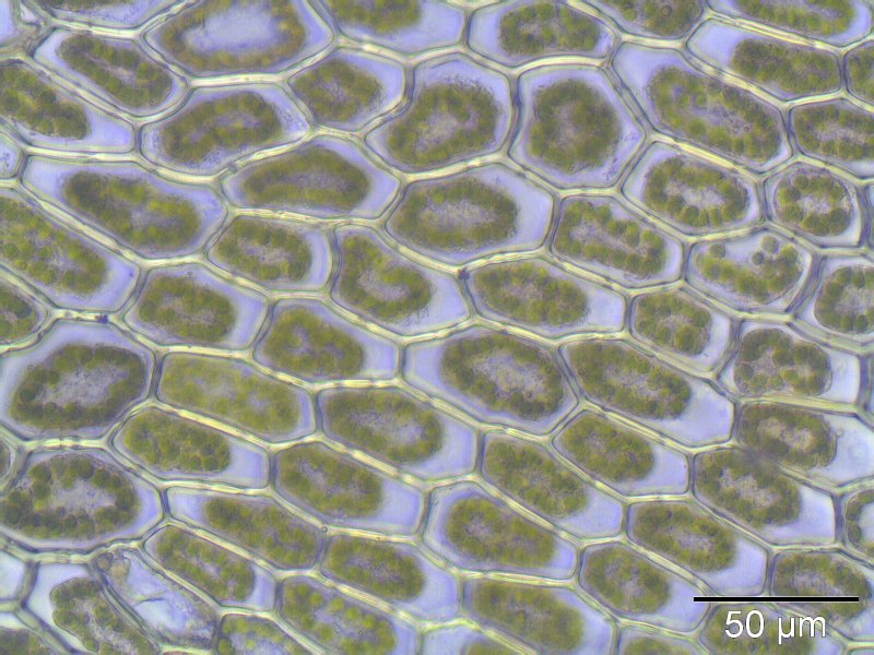 Plagiomnium elatum, Laminazellen (sind 2-3 mal so lang wie breit, der Snapshot zeigt das allerdings nicht so deutlich), etwa 400x vergrößert